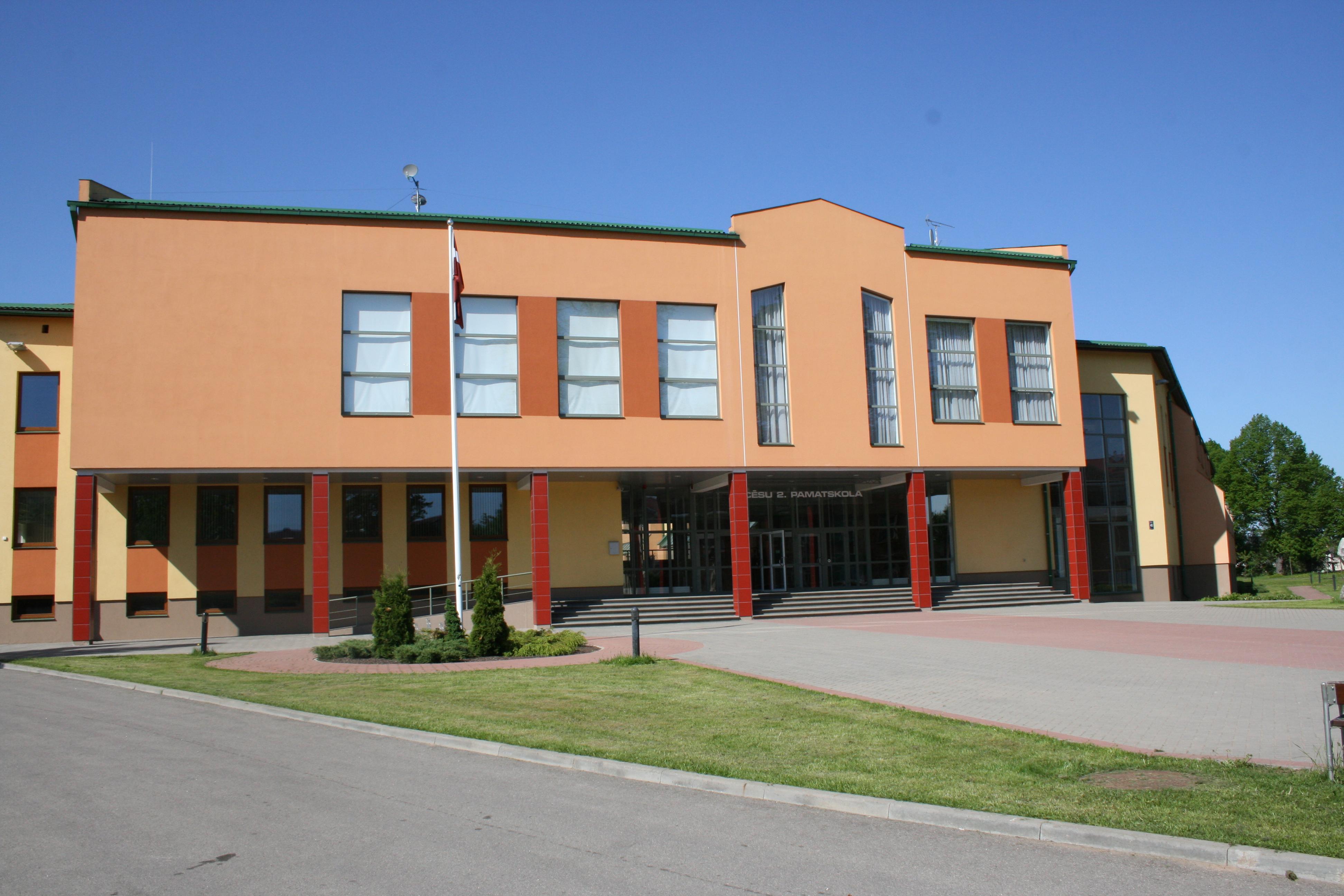 Cēsu 2.pamatskola